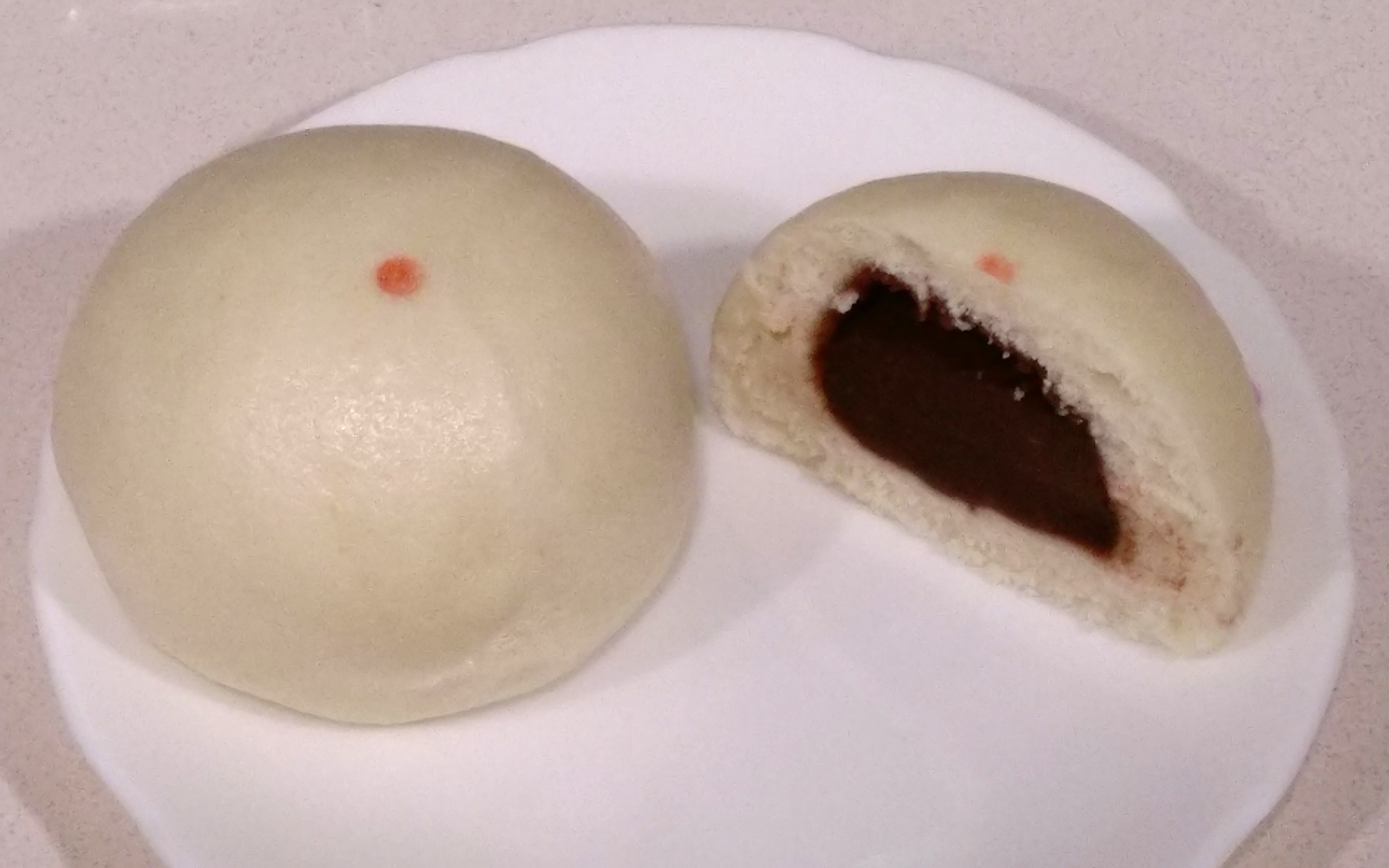 中文（台灣）: 鼎泰豐紅豆餡豆沙包（tāu-se-pau）